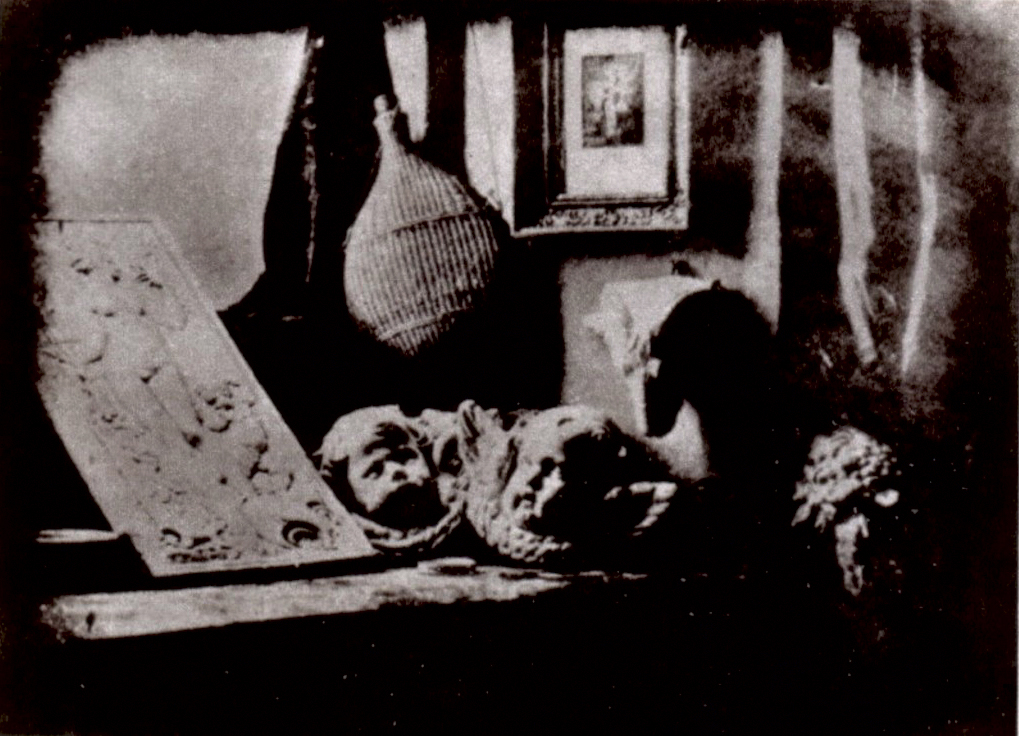 חפצים דוממים באטלייה. הדגראוטייפ המוקדם ביותר ששרד. צולם על ידי דאגר ב-1837.